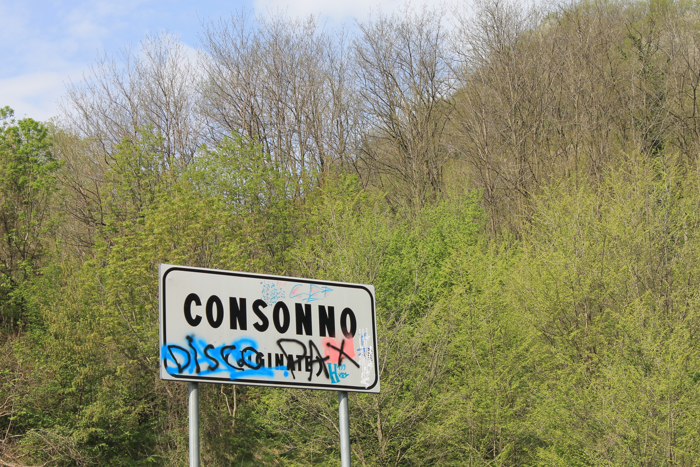 Cartello